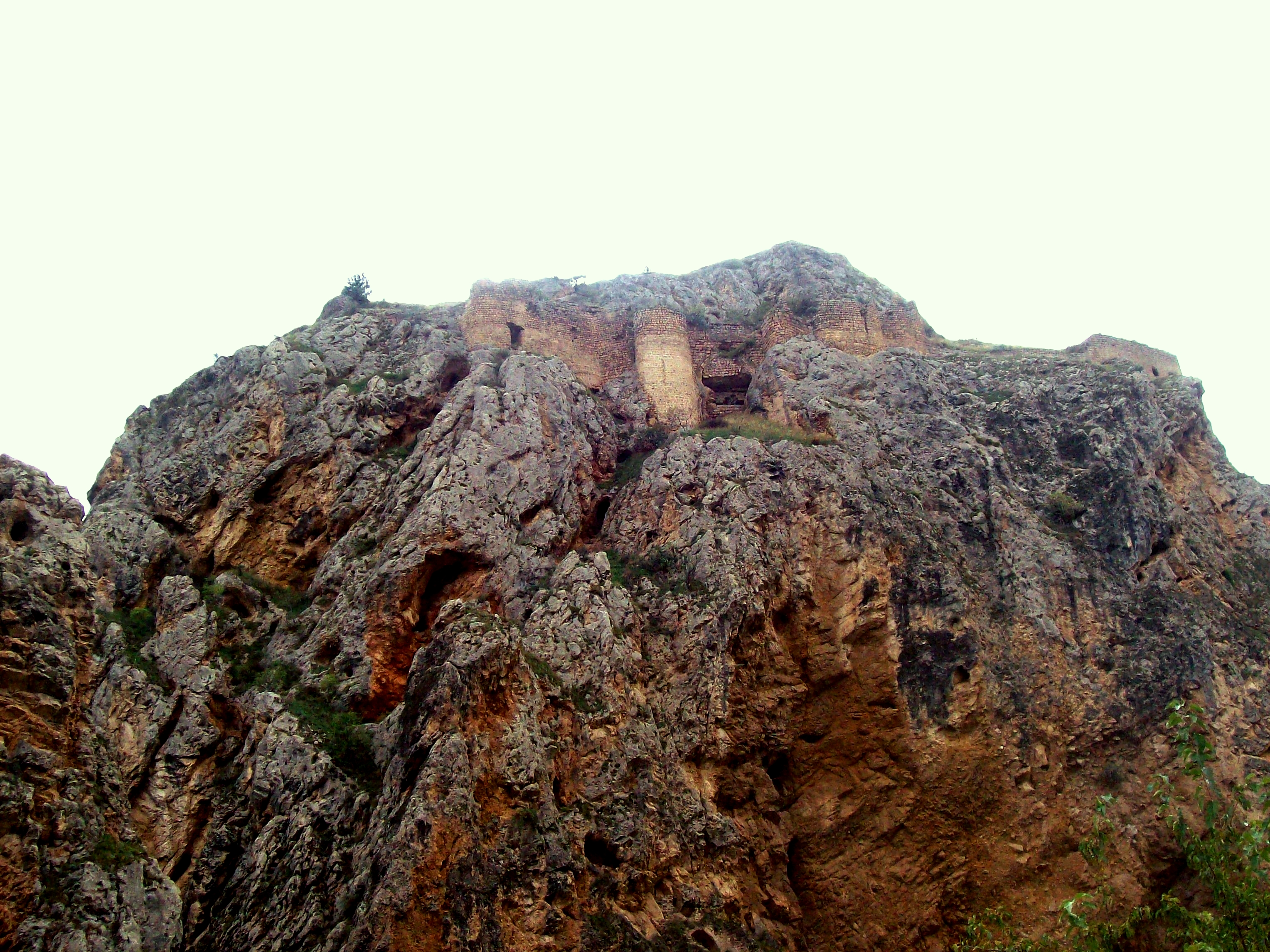 ახიზა